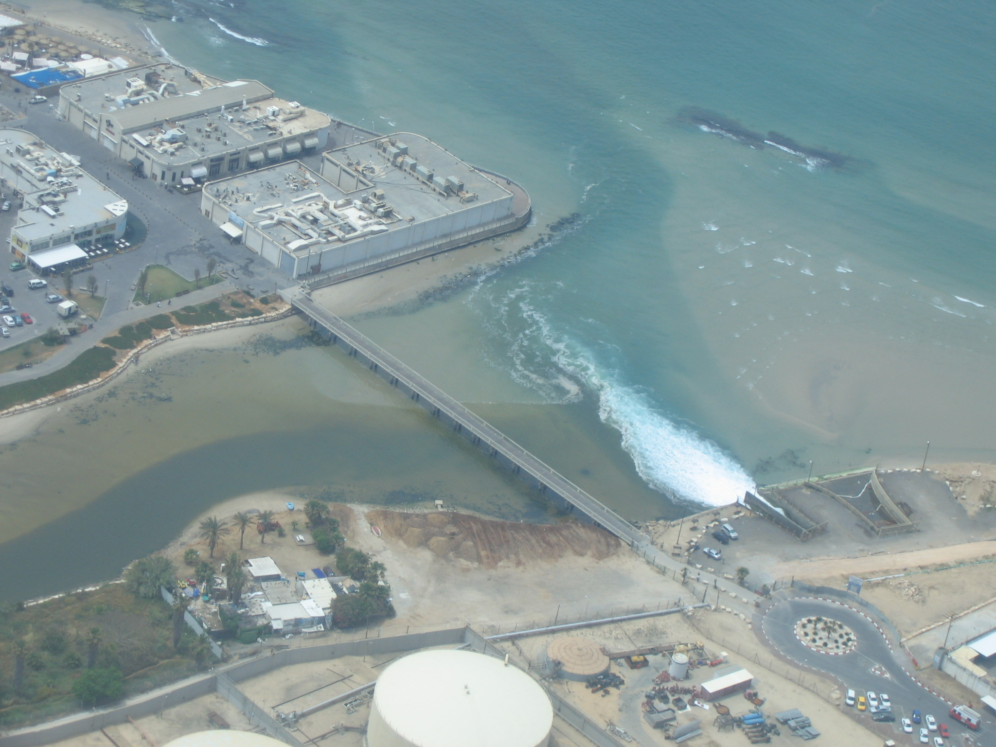 Впадение Яркона в Средиземное море